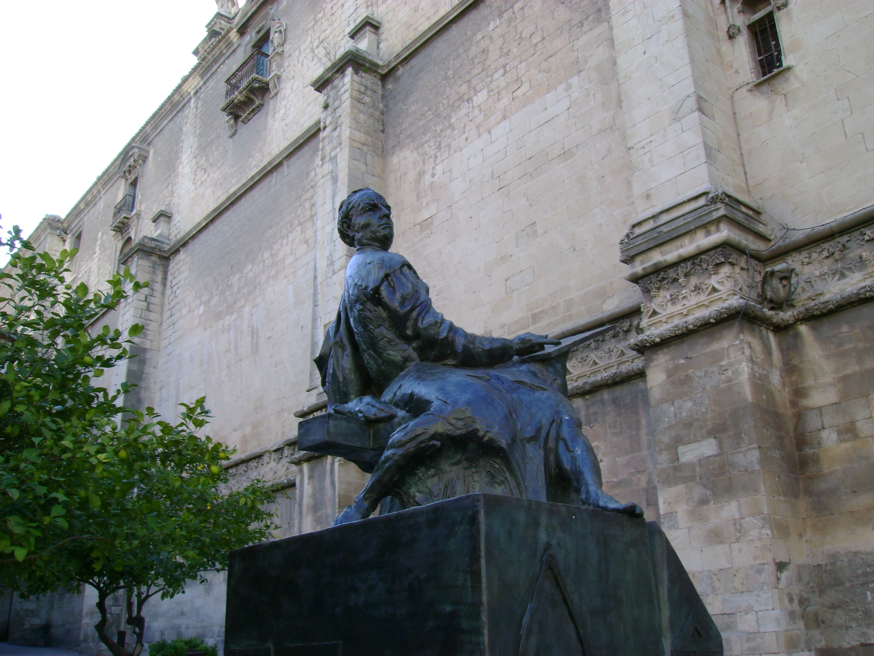 Estatua de Andrés de Vandelvira, arquitecto renacentista español, presidiendo la fachada trasera de la Catedral de Jaén. Obra del escultor Ramiro Megías López, con motivo del V centenario del nacimiento de Vandelvira (2005). La estatua presenta una cita del Diálogo de Mercurio y Carón de Alfonso de Valdés, que reza así: "(...) todos los hombres sabios endereçan sus obras a ganar fama en este mundo y gloria en el otro; buena fama digo, no por vanagloria suya, mas para que Dios sea honrrado con el buen exemplo que de su vida y obras podrán tomar os que después vendrán."